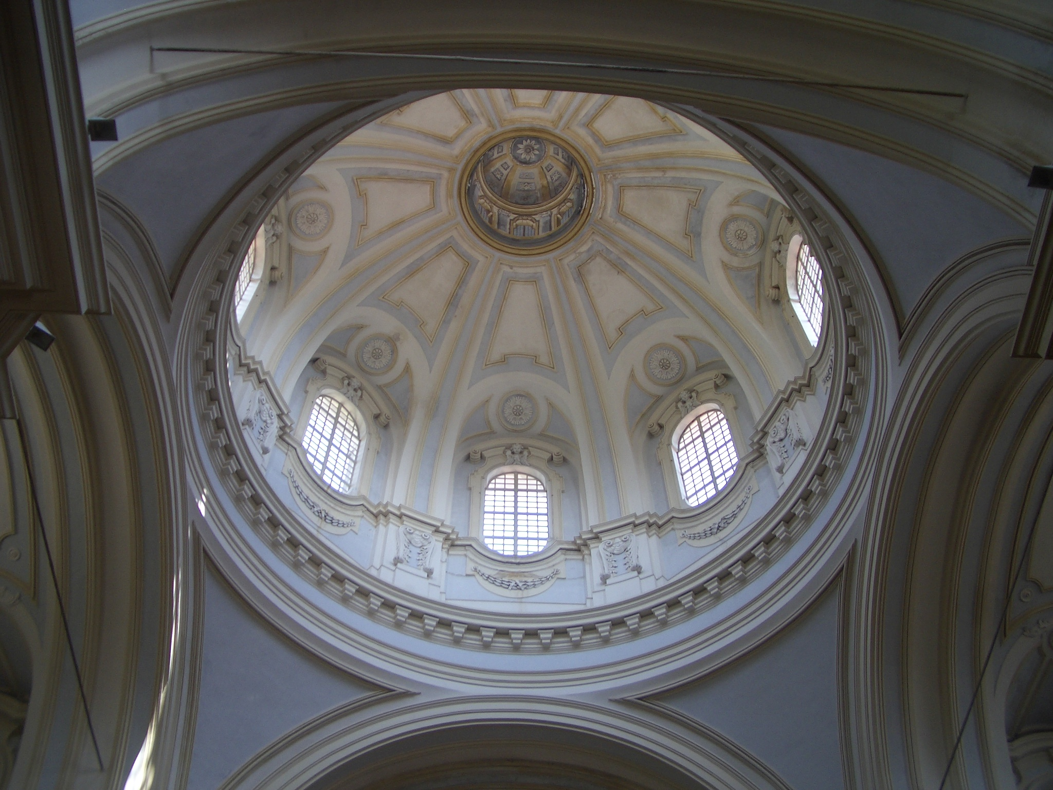 Santuario della Beata Vergine di Loreto, Dome of the Church, Graglia (Biella), Italy